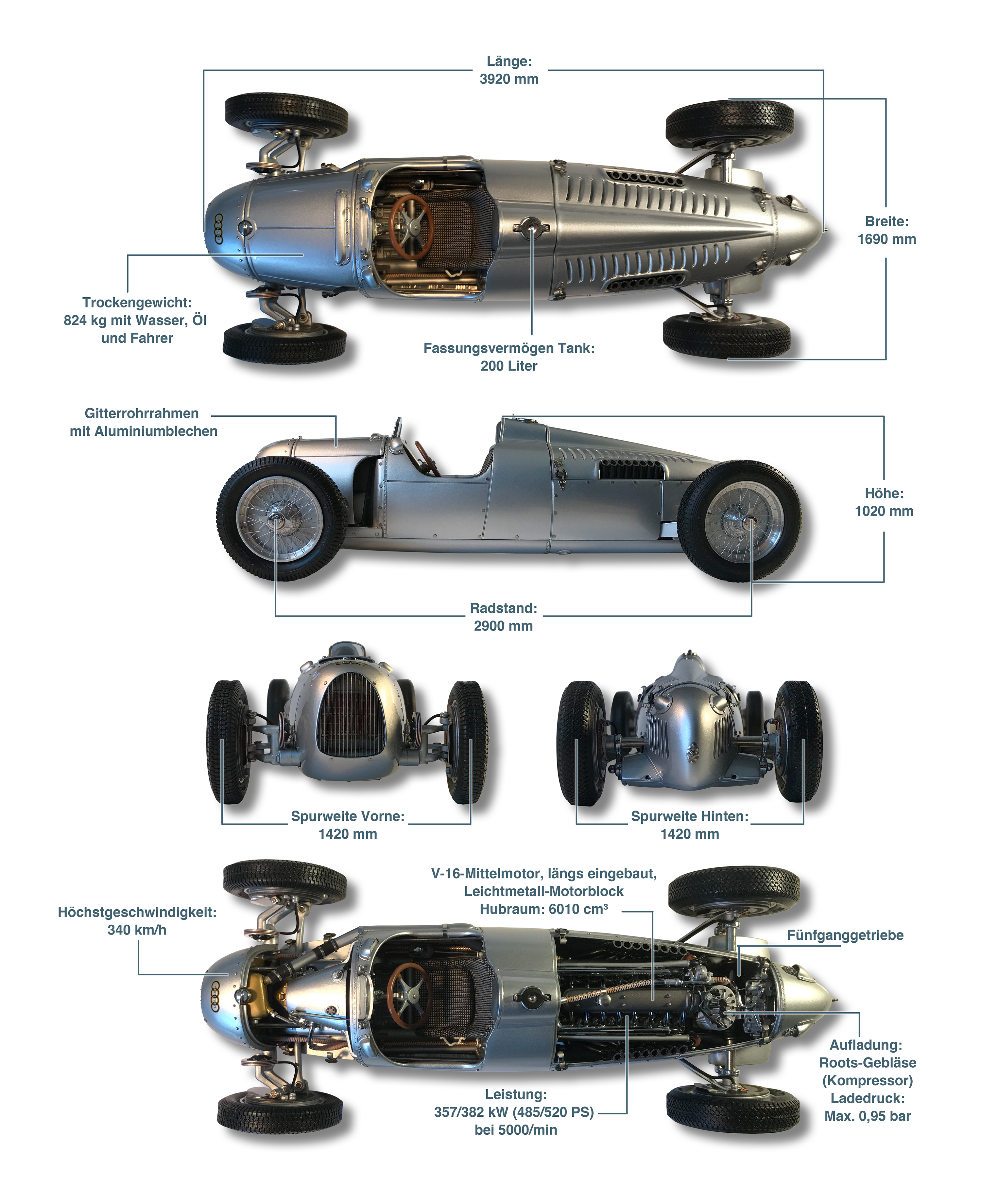 Grafisch aufbereitete Basis-Informationen zum Auto-Union-Rennwagen Typ C